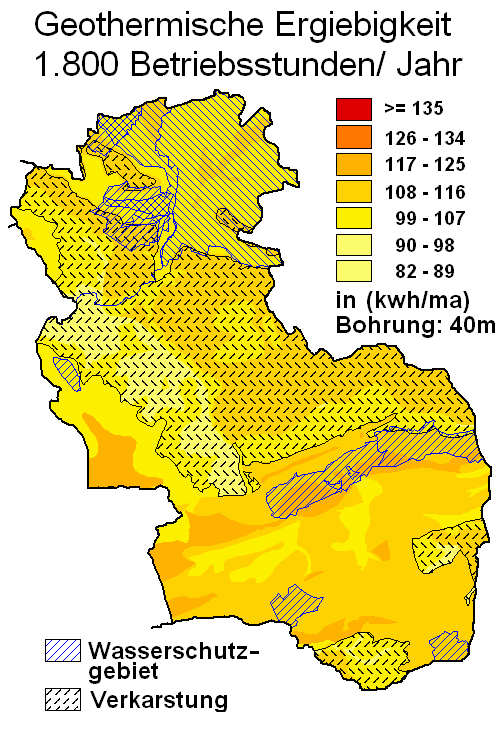 geothermische Karte Lügde